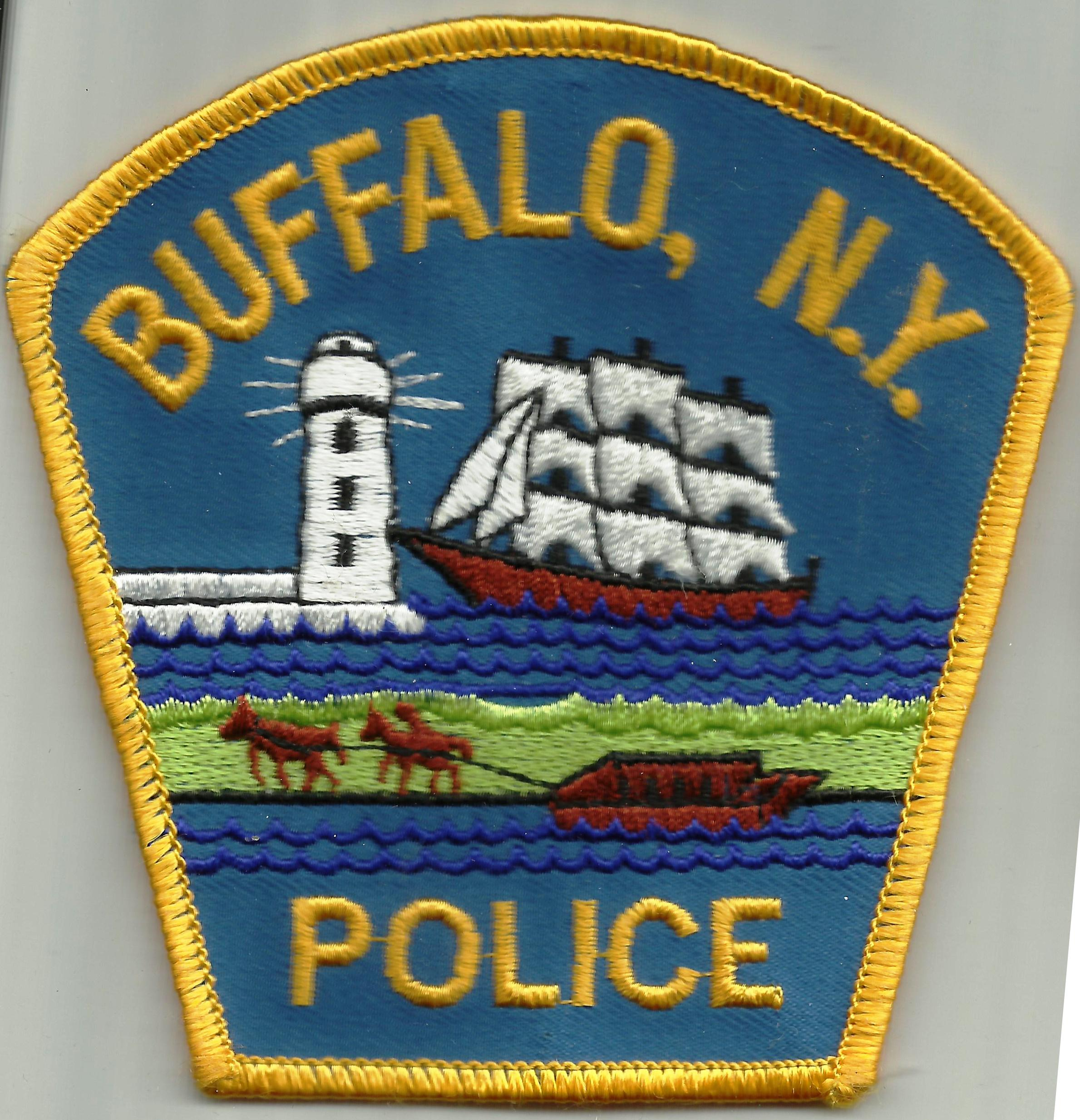 USA - NEW YORK - Buffalo